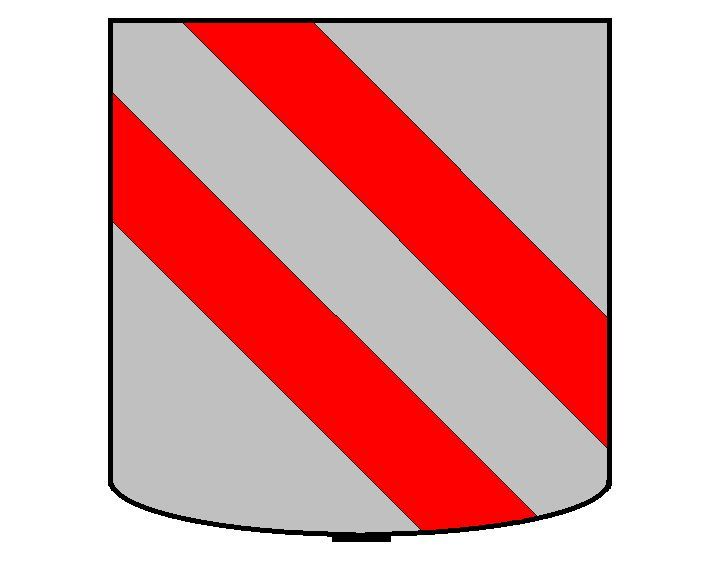 Grb porodice Dudan